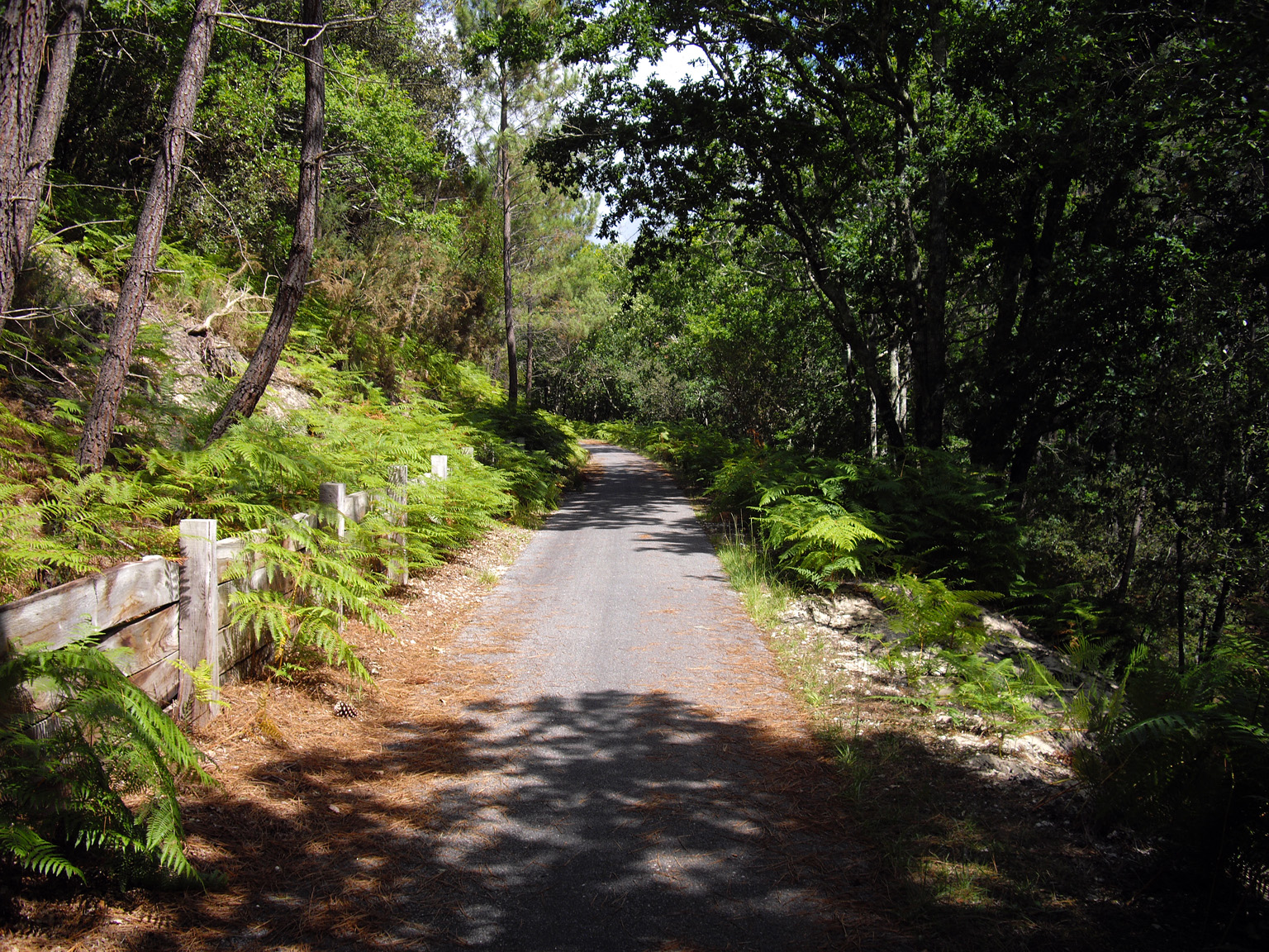 Piste cyclable reliant Le Moutchic (Lacanau) et Maubuisson (Carcans) en Gironde (France)